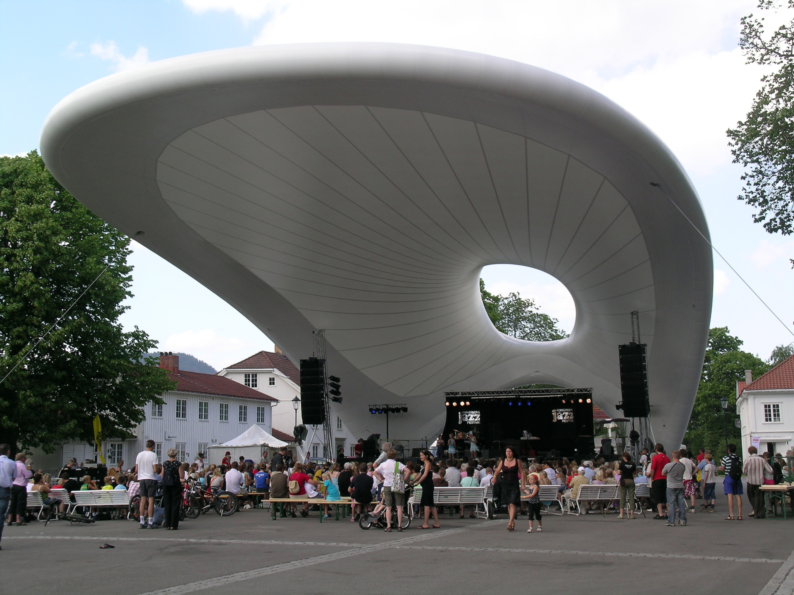 Snøhetta: «Tubaloon». Kongsberg, Norway. Opened 2006.